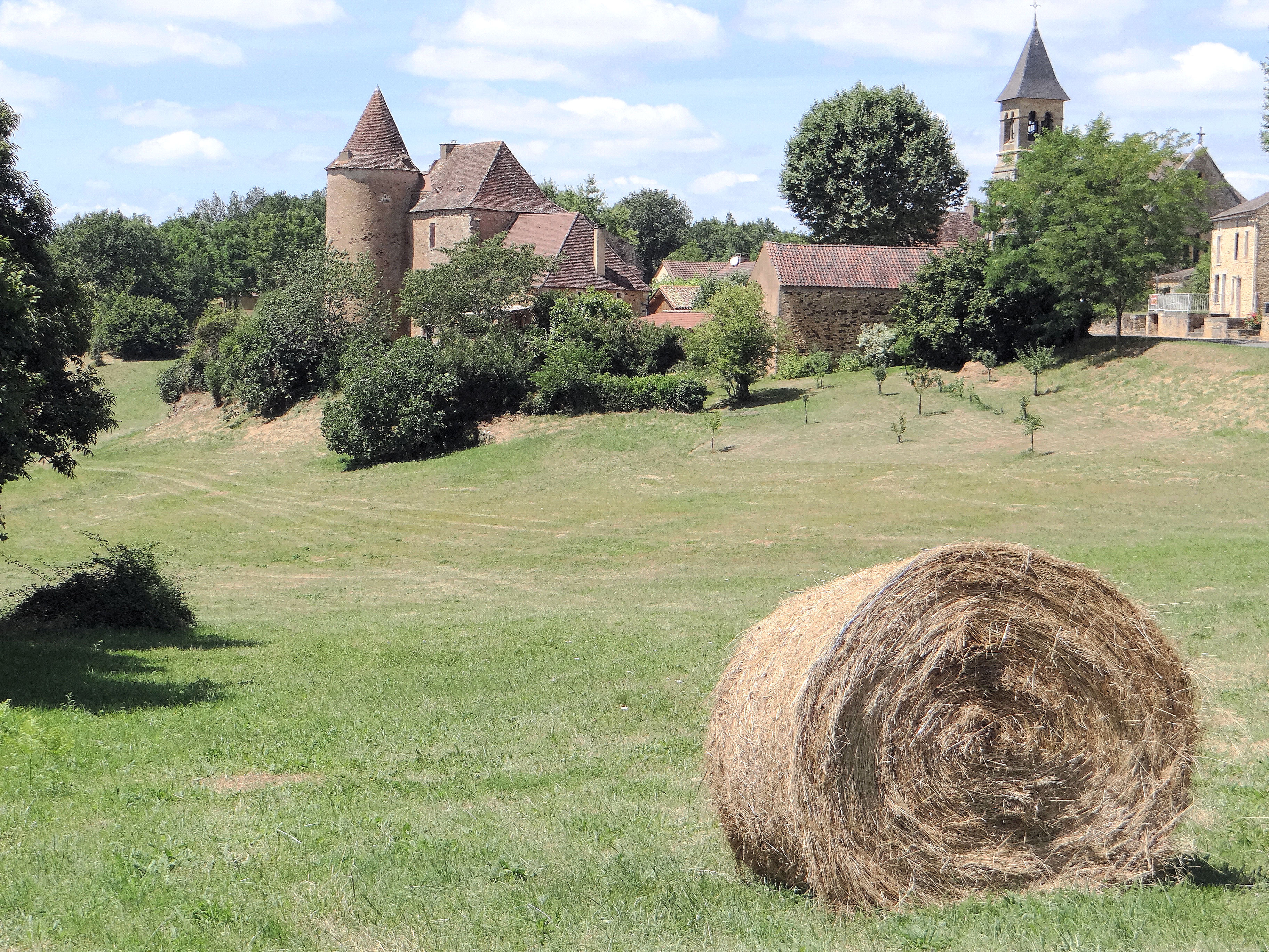 Saint-Chamassy - Manoir du XVe siècle et église